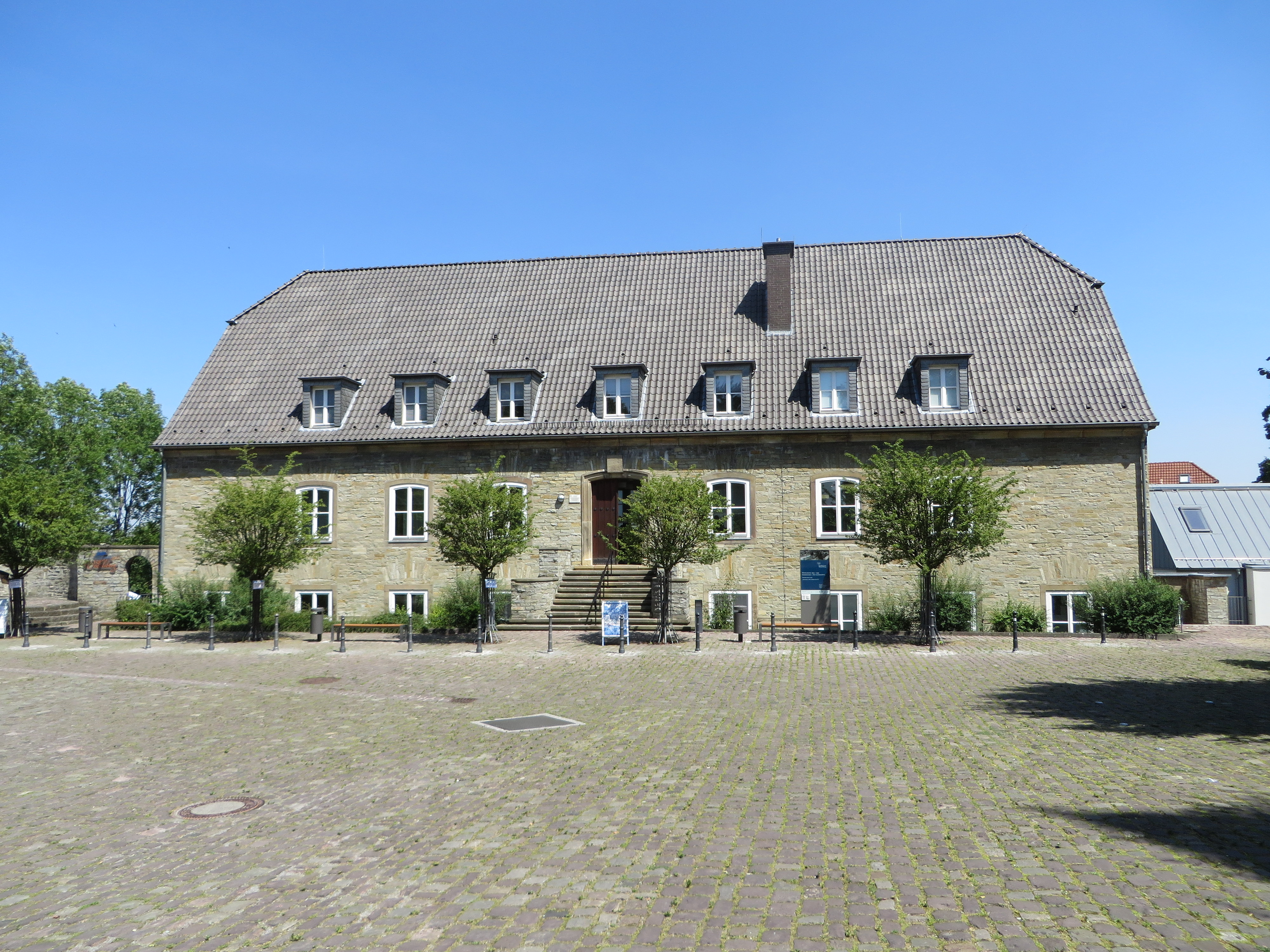 Erinnerungsstätte Wewelsburg 1933–1945 in Wewelsburg, ehemaliges SS-Wachgebäude